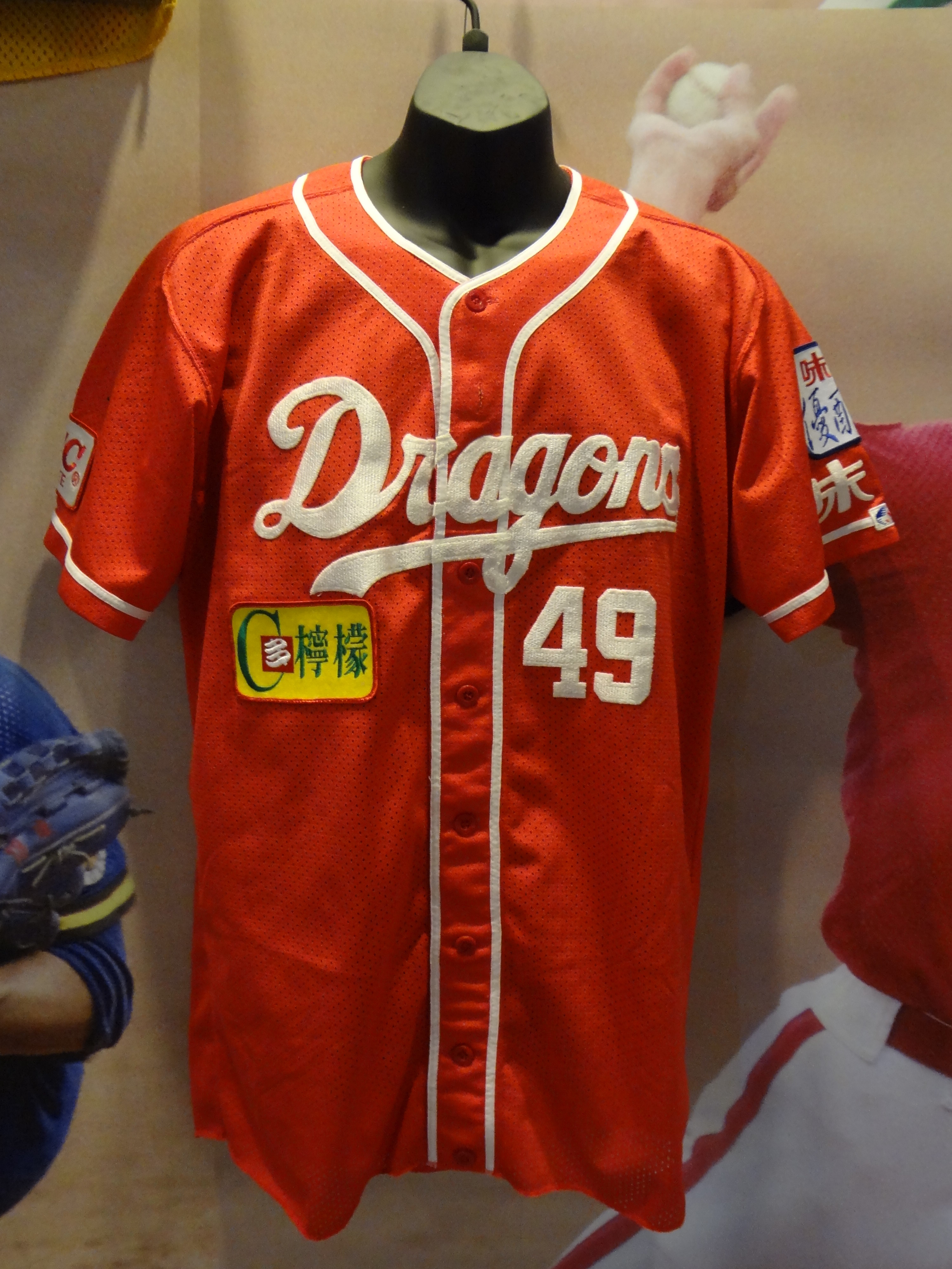 松山文化創意園區「金鐘五十．響」特別展展示品：中華職棒創始球隊味全龍球衣。